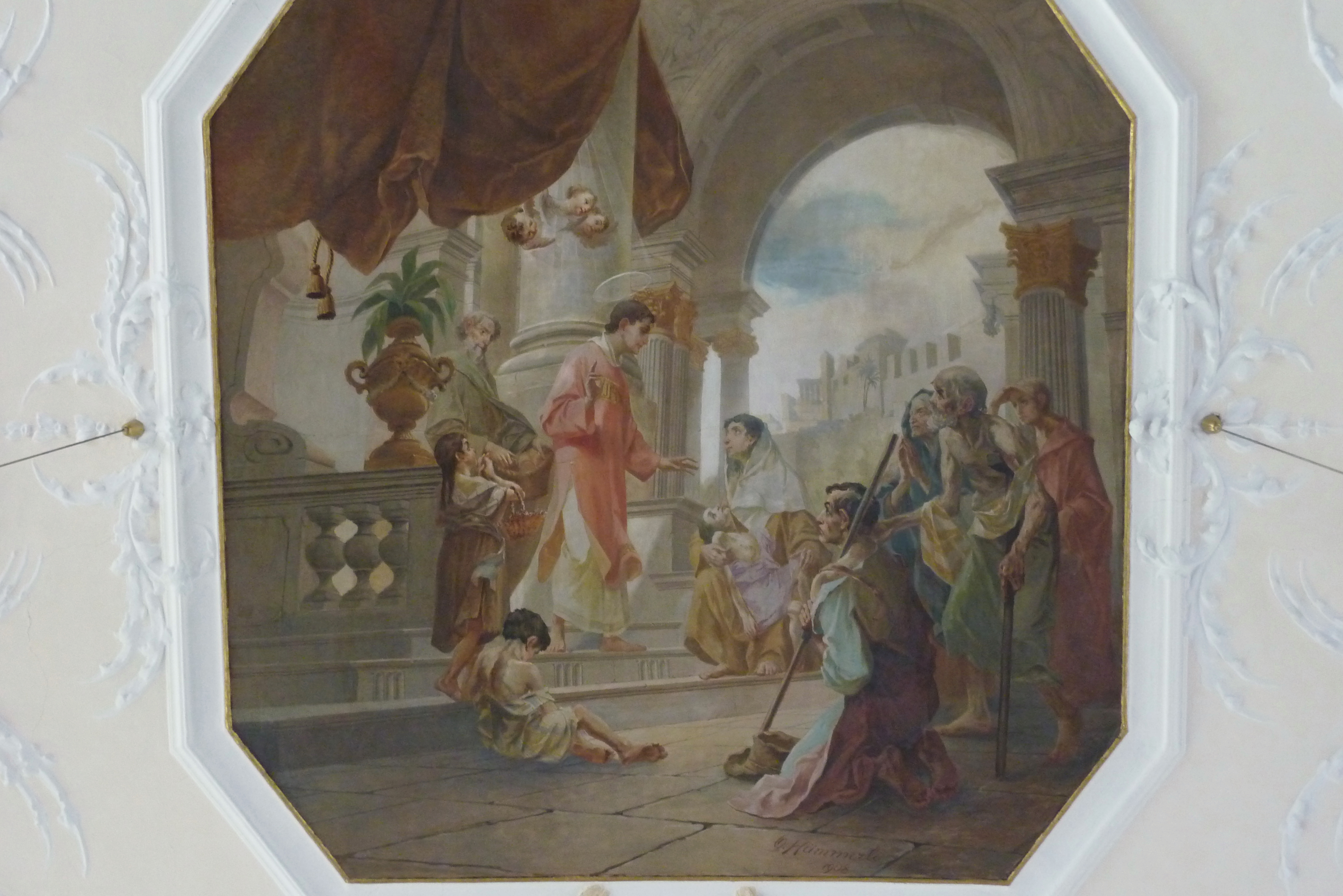 Katholische Pfarrkirche St. Stephanus in Hainhofen (Neusäß), Deckengemälde im Langhaus, Darstellung: Heilung eines Kranken durch den hl. Stephanus